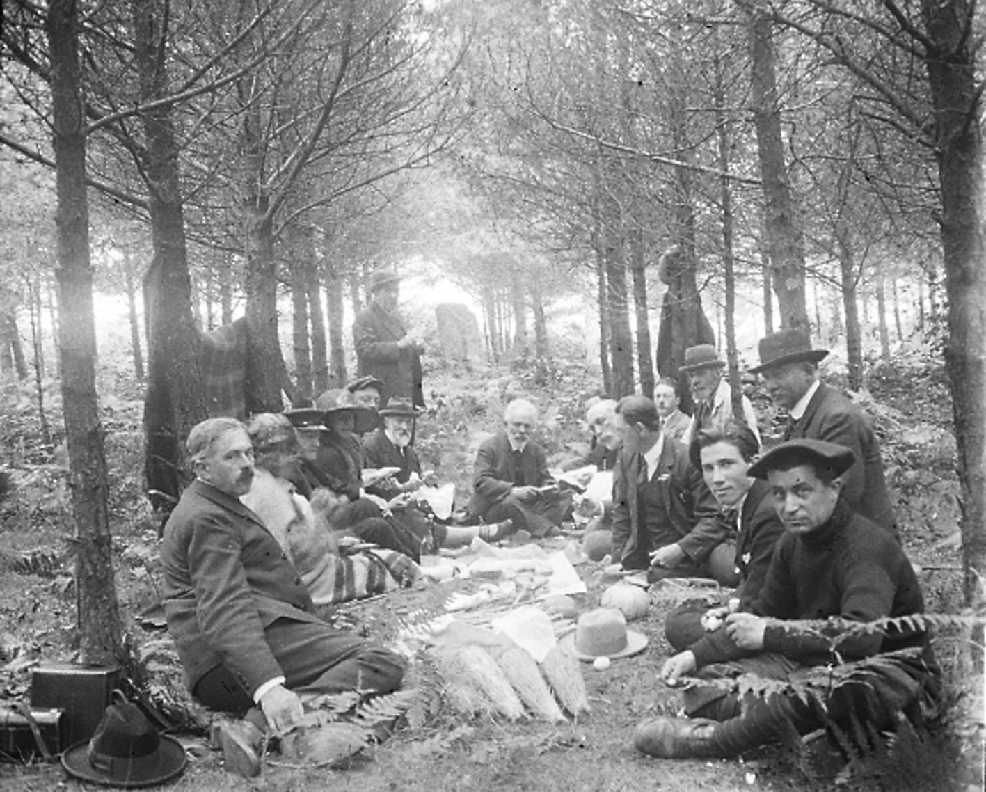 déjeuné lors d'une visite archéologique.